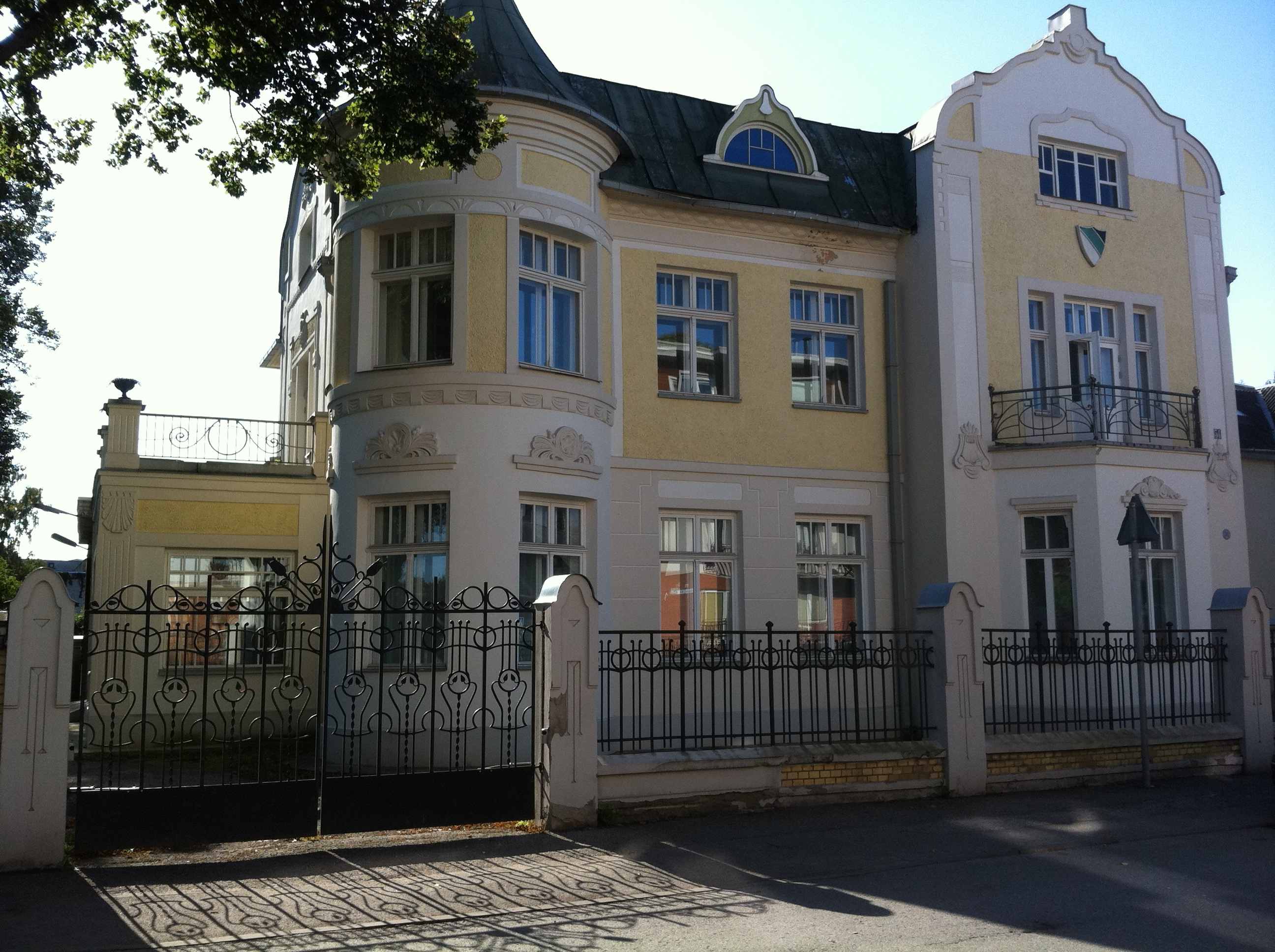 Elamu Tartus Vanemuise 54